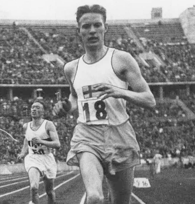 Lars Larsson (athlete)